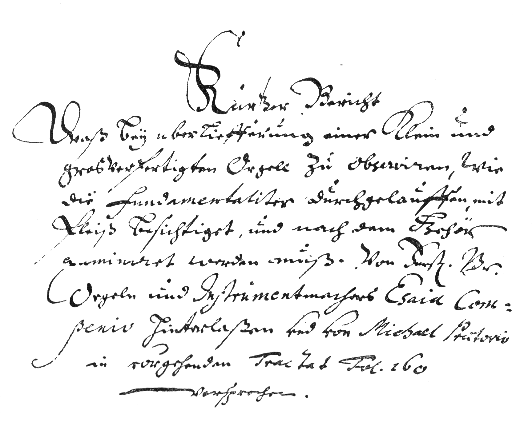 Orgeln Verdingnis facsimile p. 1